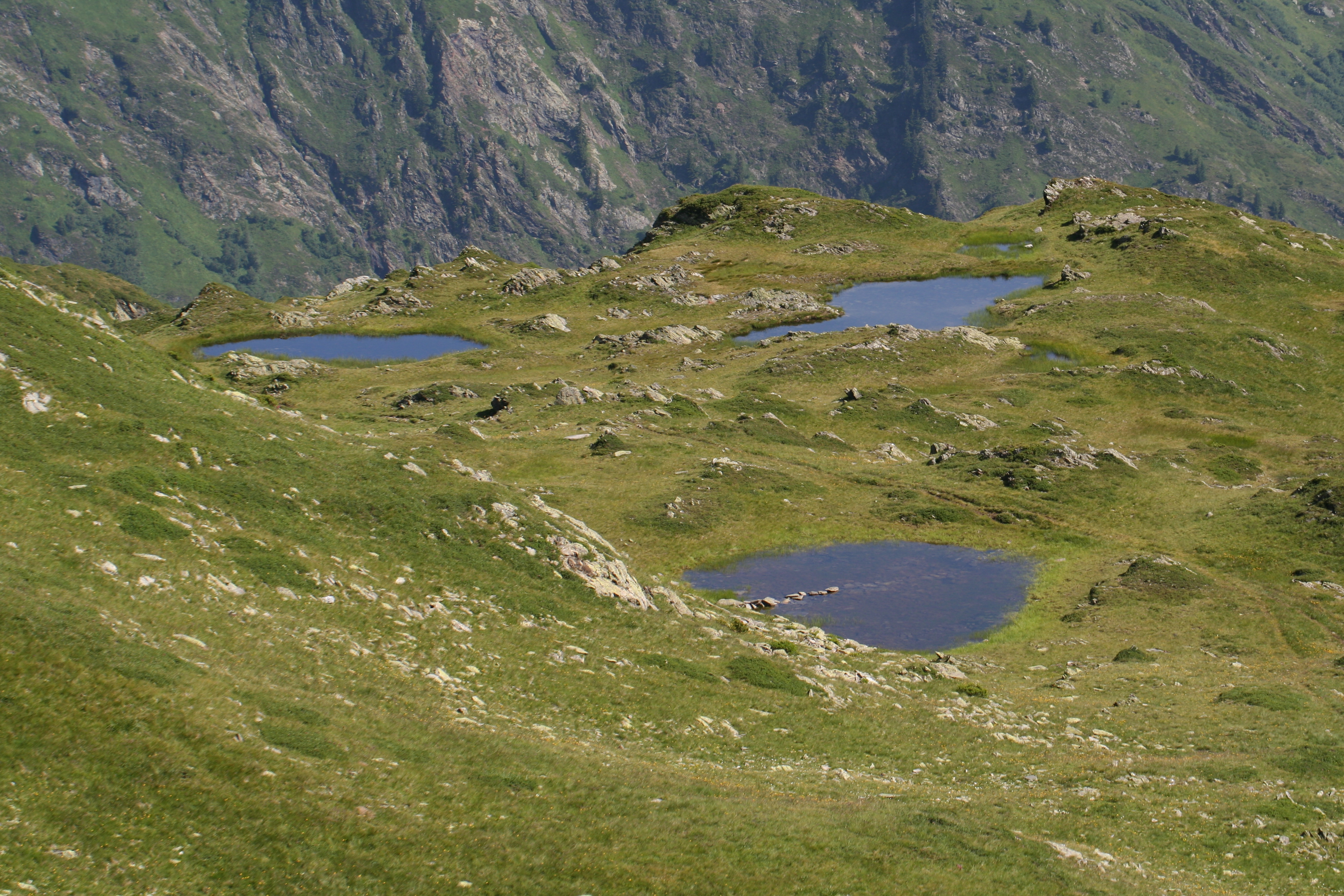 Ensemble de petites zones humides dans la RNN de Carlaveyron